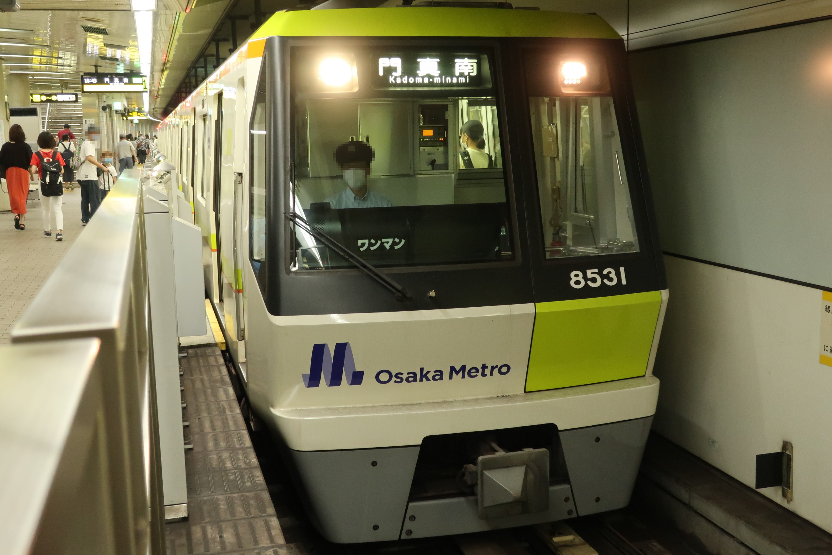 長堀鶴見緑地線80系（第31編成） 2020.7.12 蒲生四丁目